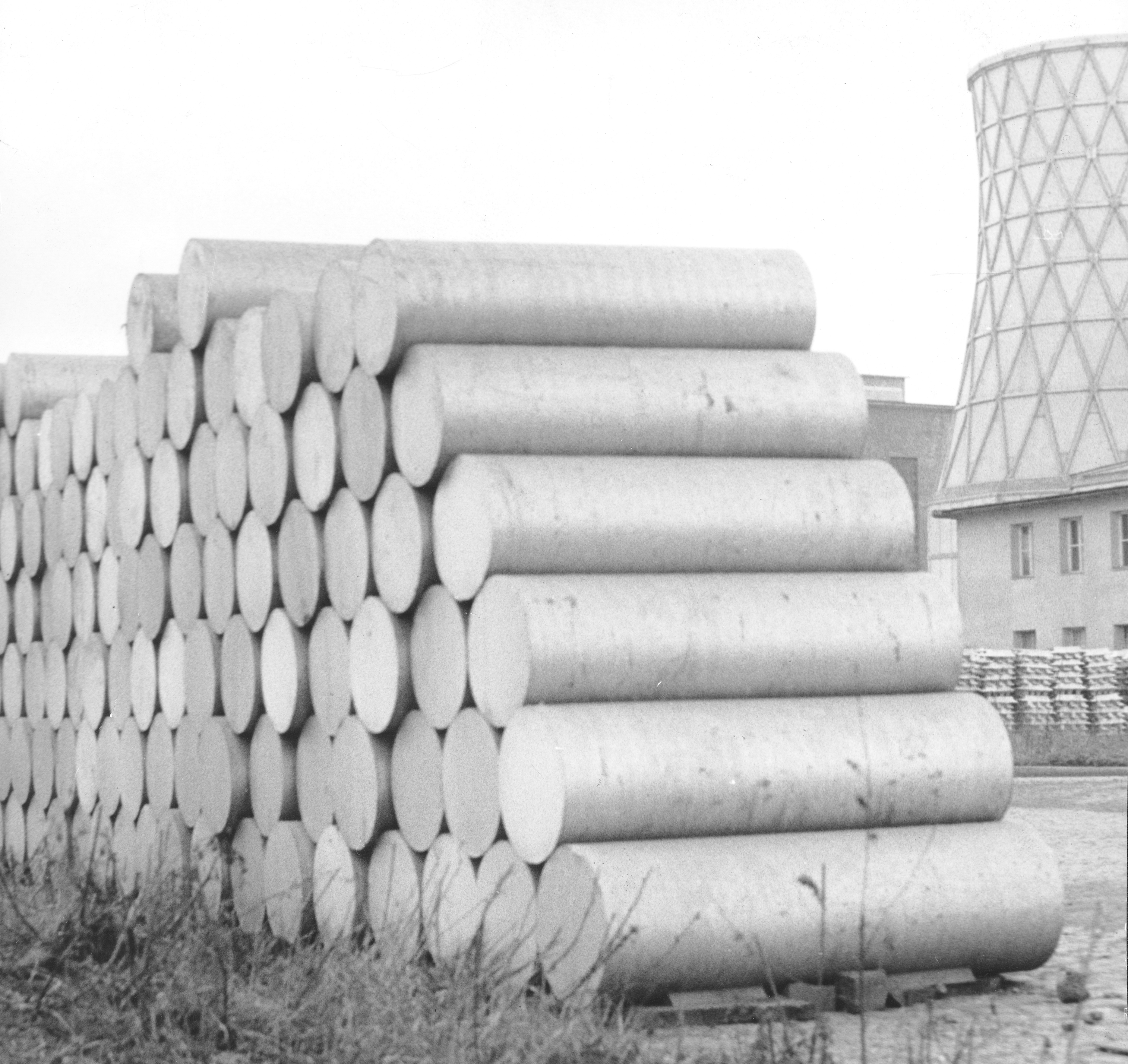 Tovarna glinice in aluminija Kidričevo - kupi aluminija.